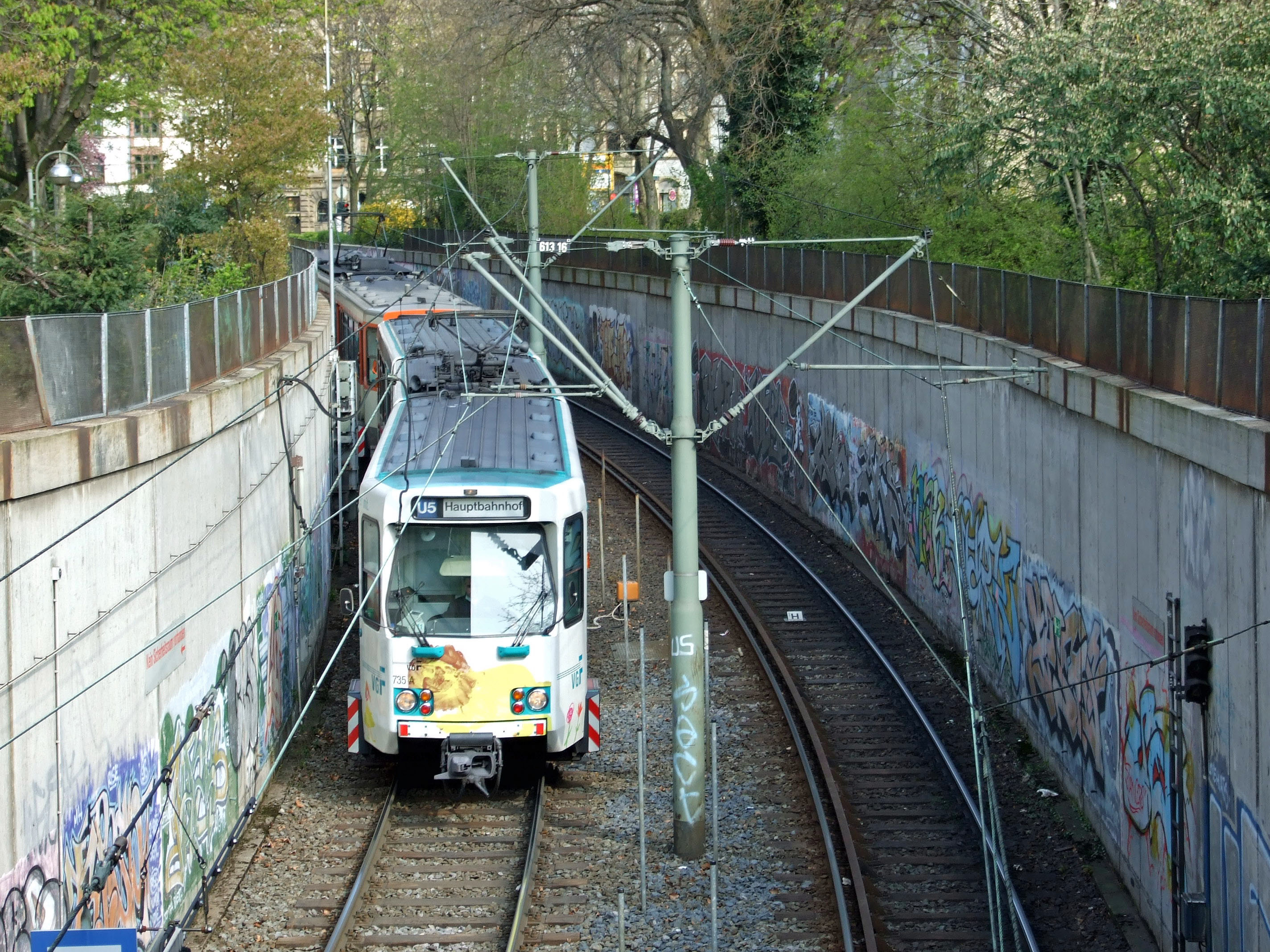 Tunnelrampe der U5, Blickrichtung Eckenheimer Landstrasse - Zug von Eckenheimer Landstrasse (aus Preungesheim - Richtung Hauptbahnhof) kommend.